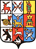 Герб Княжества и области Великороссийские